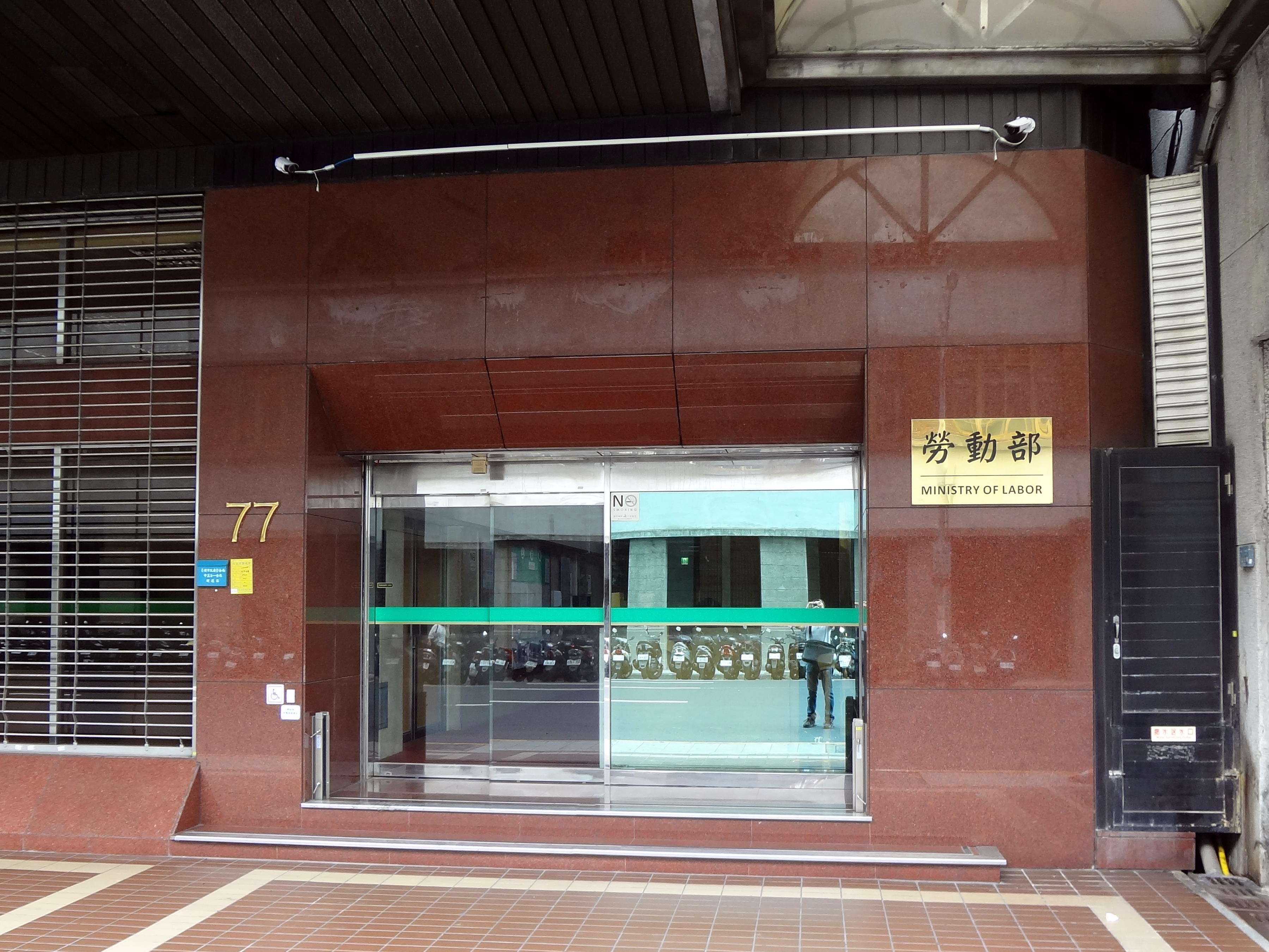 臺灣省合作金庫大樓大門，位於臺北市中正區館前路77號1樓，右側掛中華民國勞動部銘板。